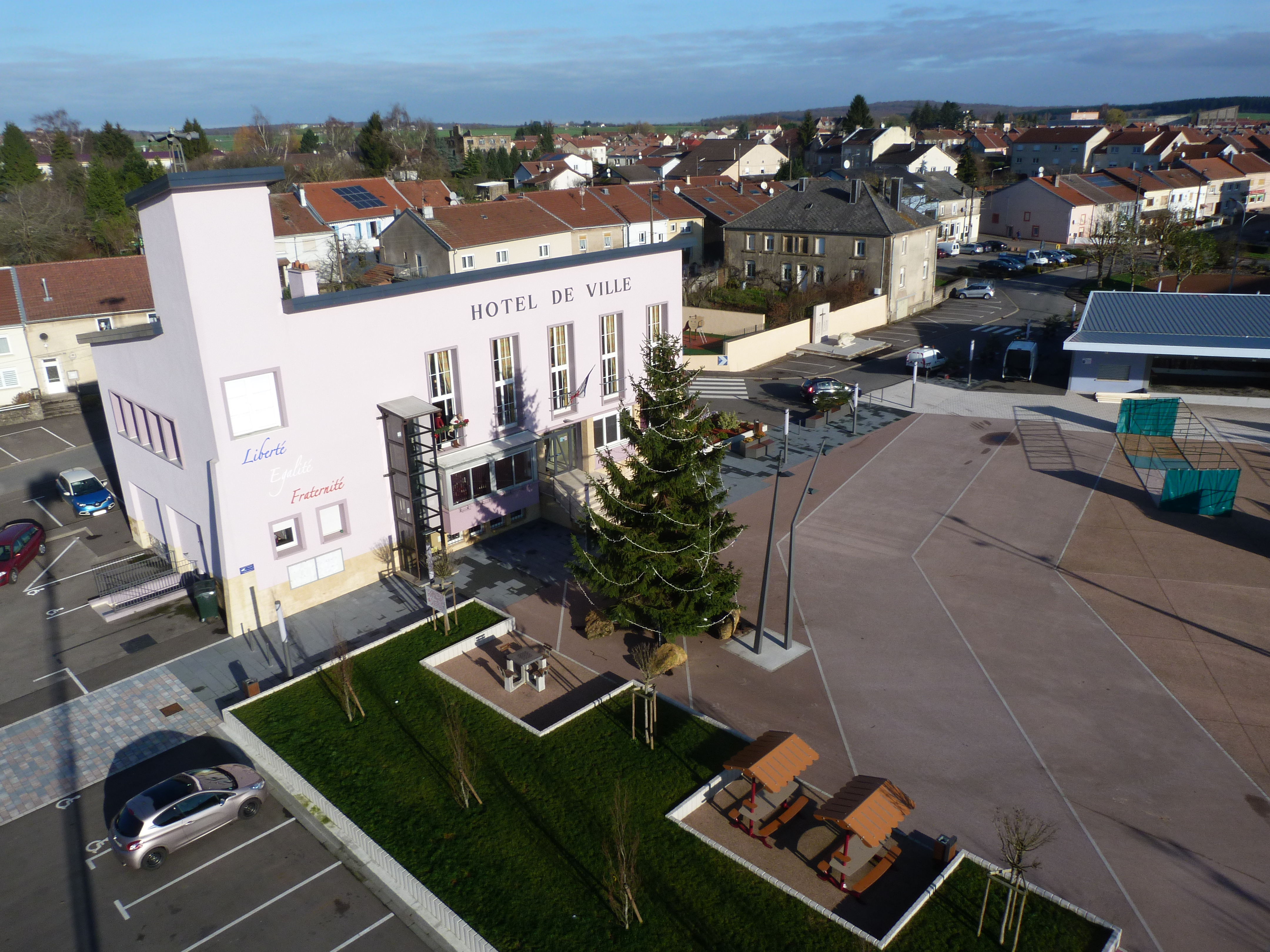 Place de l'Hôtel de Ville